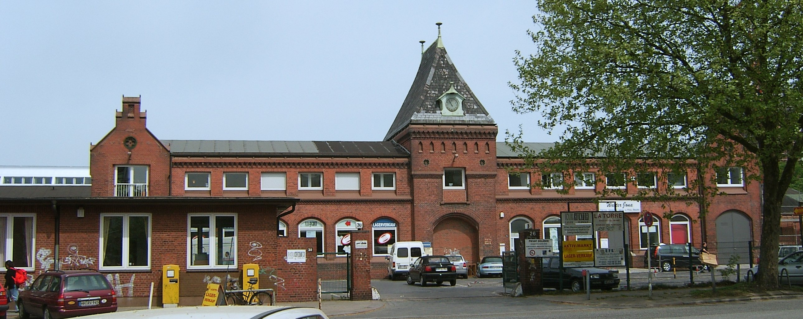 Eingangsbereich des ehemaligen Schlachthofes (heute Fleischgroßmarkt) auf St. Pauli.